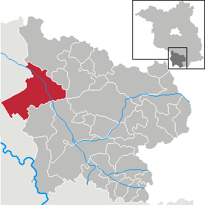 Herzberg (Elster) in Brandenburg (Country) - District Elbe-Elster